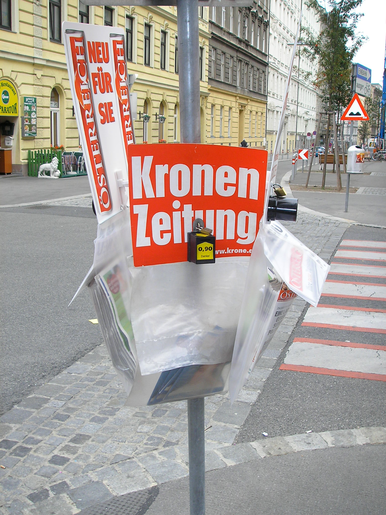 "Sonntagsstandln", Entnahmebeuteln für Sonntagszeitungen auf Straßen und Gehsteigen.